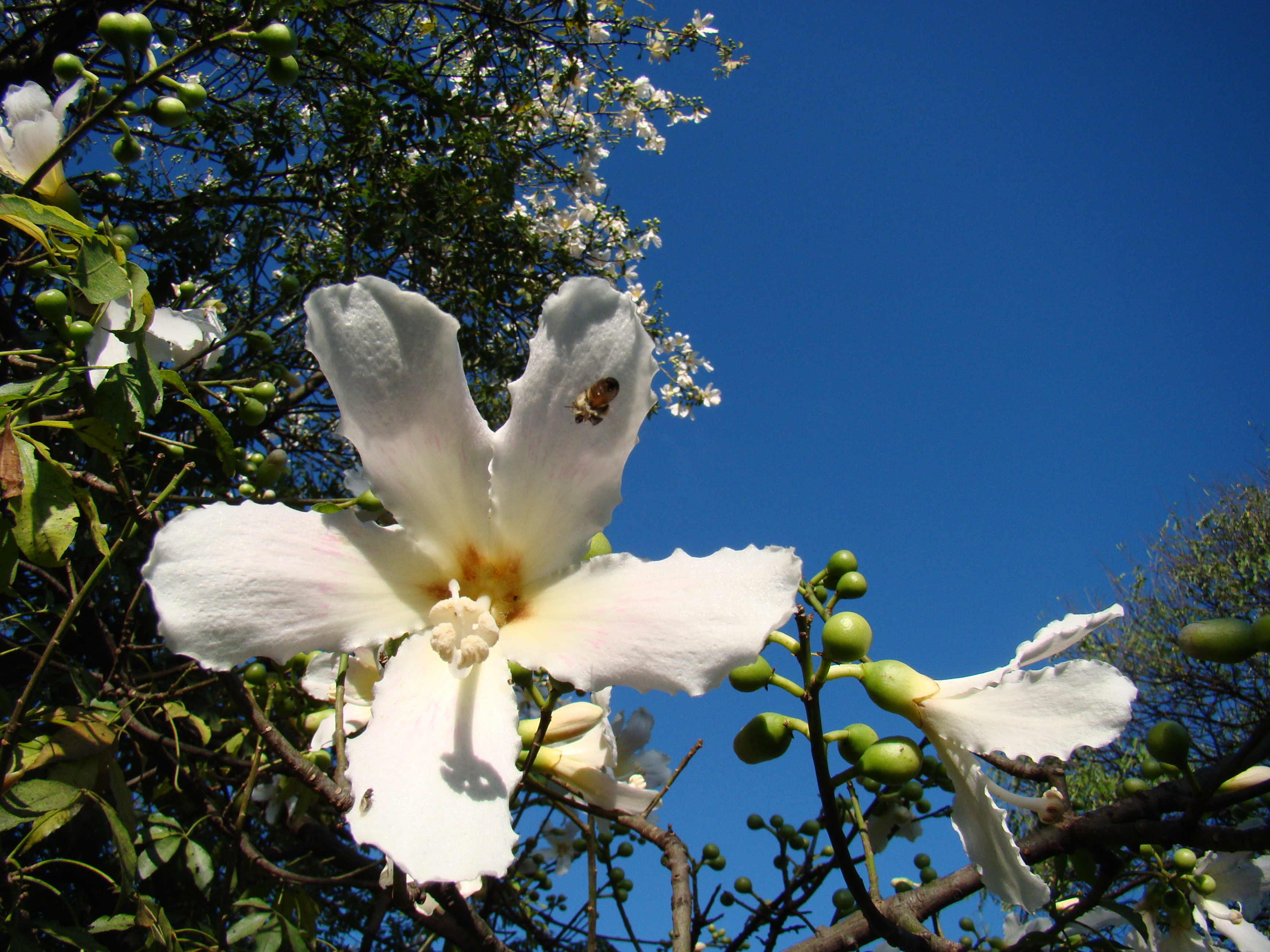 Ceret Park S�o Paulo